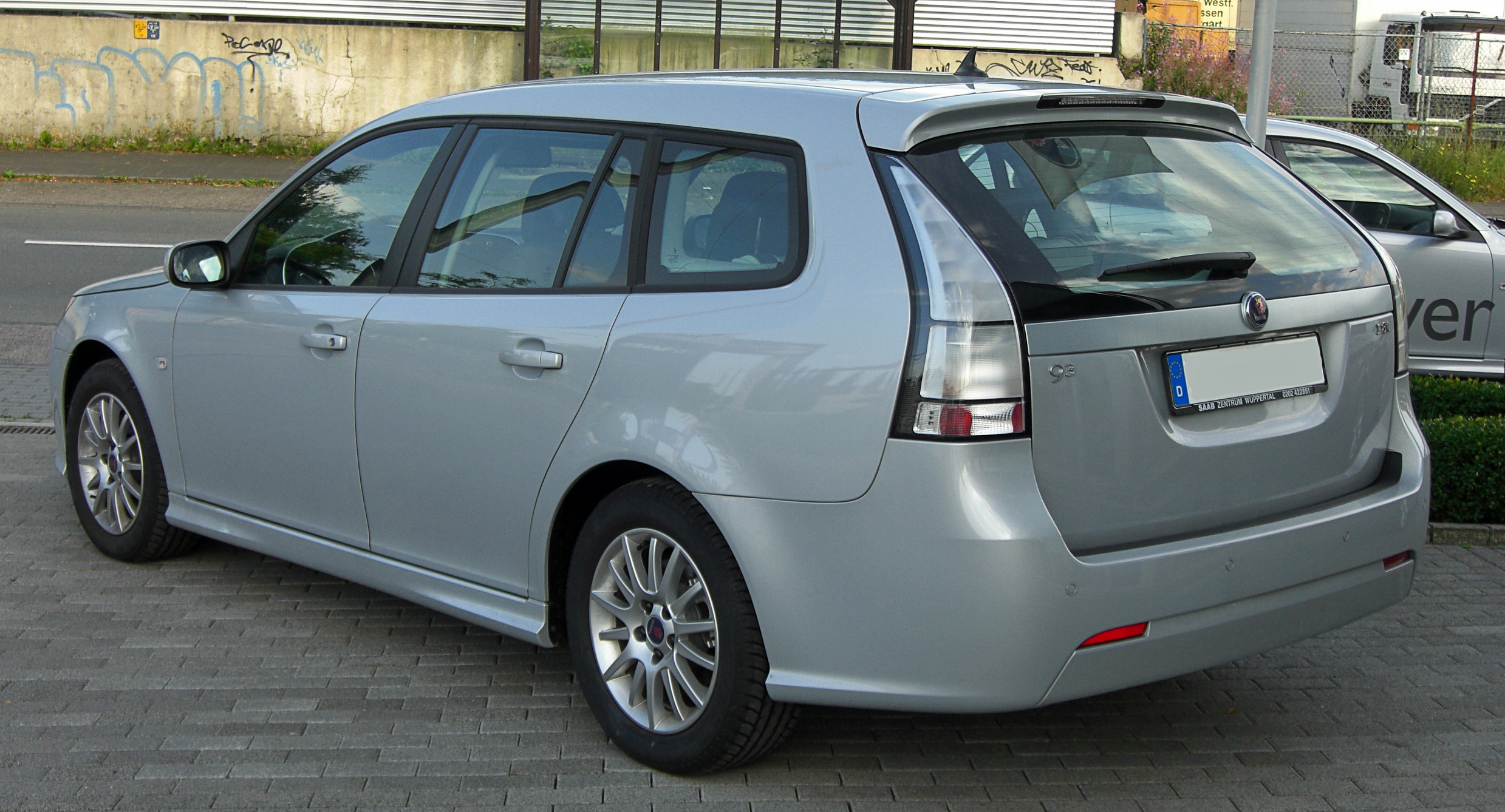 Saab 9-3 SportCombi